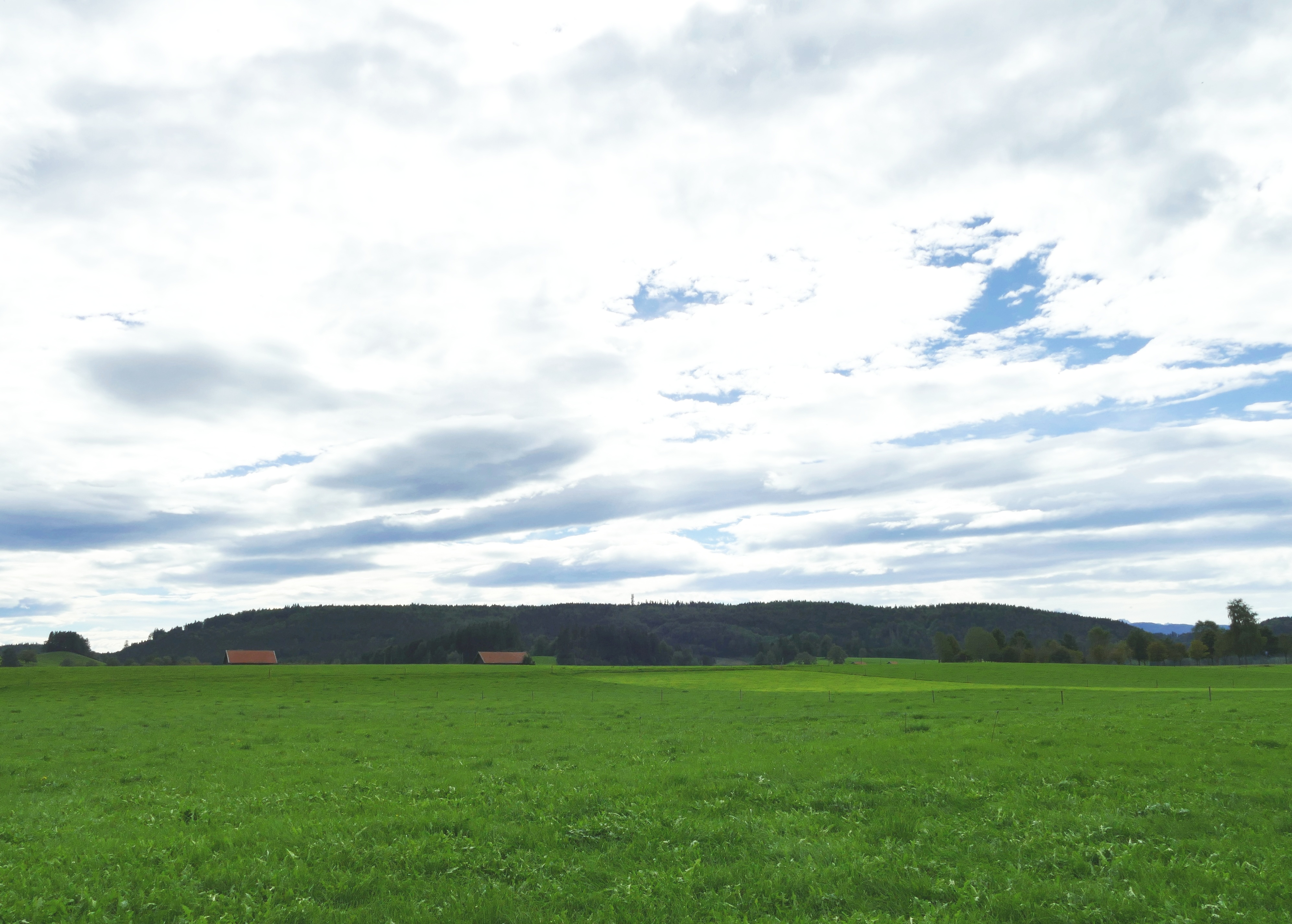 Der südöstlich von Peiting gelegene Moränenhügel Schnaidberg von Westen gesehen. In der Mitte der Funkturm Rottenbuch.